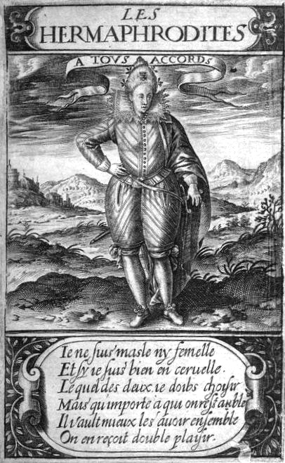 Caricature dr Henri III de France (1551-1589), de Les Hermaphrodites (1605) par Thomas Artus Texte en moyen français : Ie ne ſuis masle ny femelle Et ſi ie ſuis bien en ceruelle Lequel des deux ie doibs choiſir Mais qu’importe à qui on reſſamble Il vault mieux les avoir enſemble On en reçoit double plaiſir.